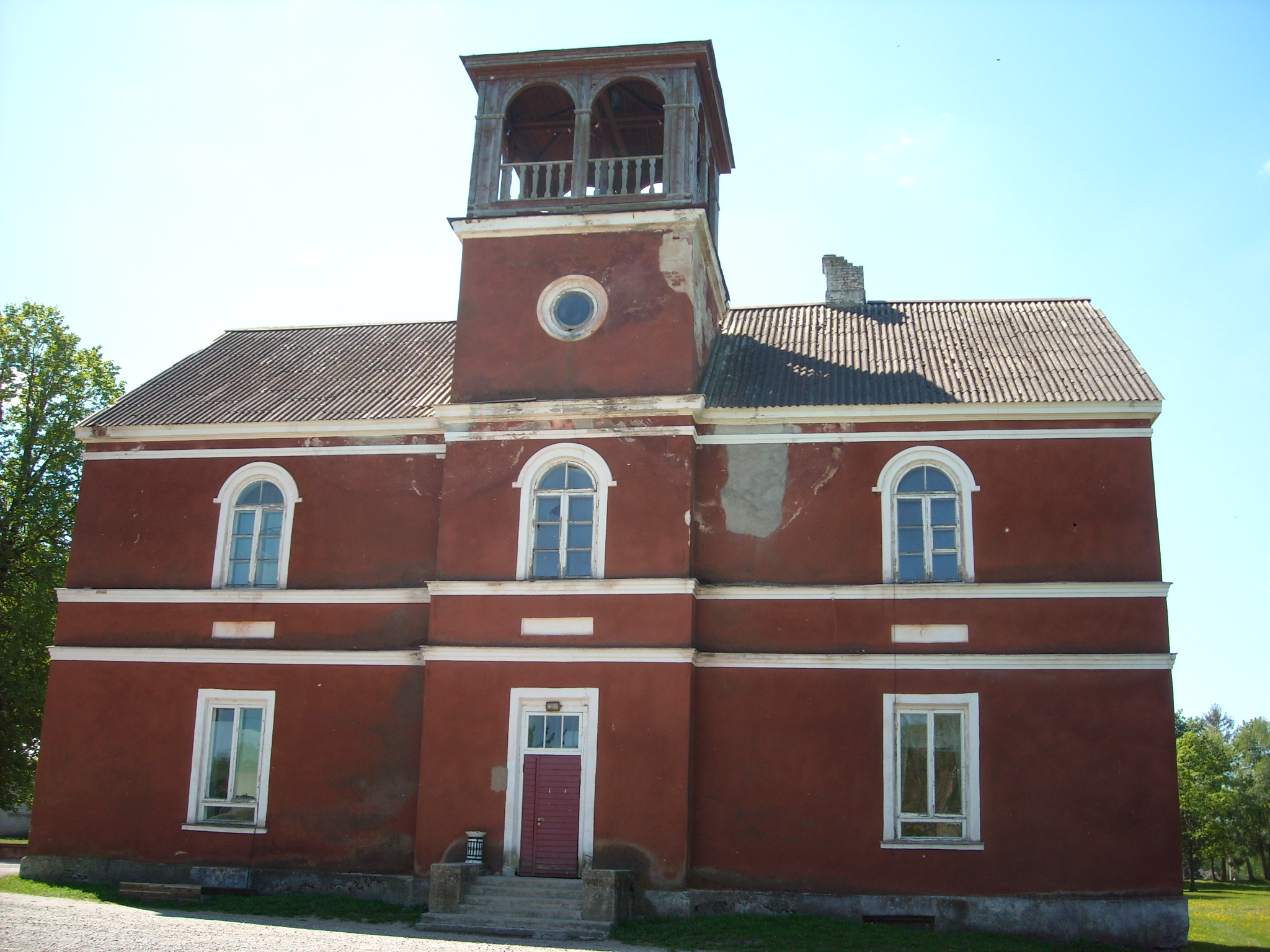 Ulvi mõis, Rägavere vald, Lääne-Virumaa